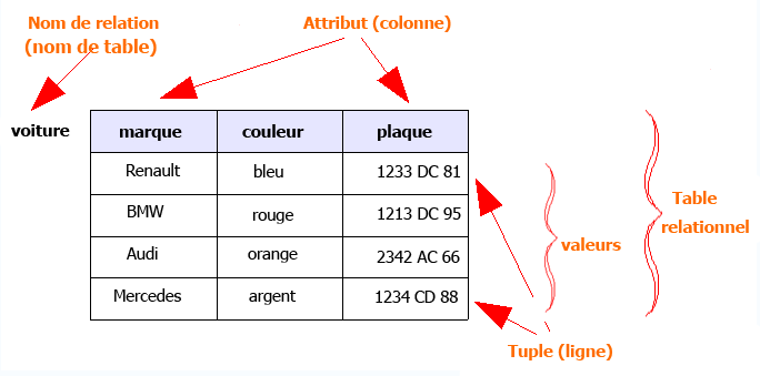 formation de table relationnel ( Description table relationnelle Date2008Sourcemoi mêmeAuthorPuerto Rico ) table relationnelle